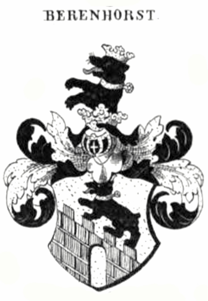 Wappen der unehelichen Nachkommen des Fürsten Leopold I. zu Anhalt-Dessau und seiner Geliebten Söldner, anlässlich ihrer Erhebung als von Berenhorst, in den Reichsadelsstand um 1750. Schild nachempfunden dem mythischen Adelsgeschlecht der Beringer, Vorfahren der Askanier.